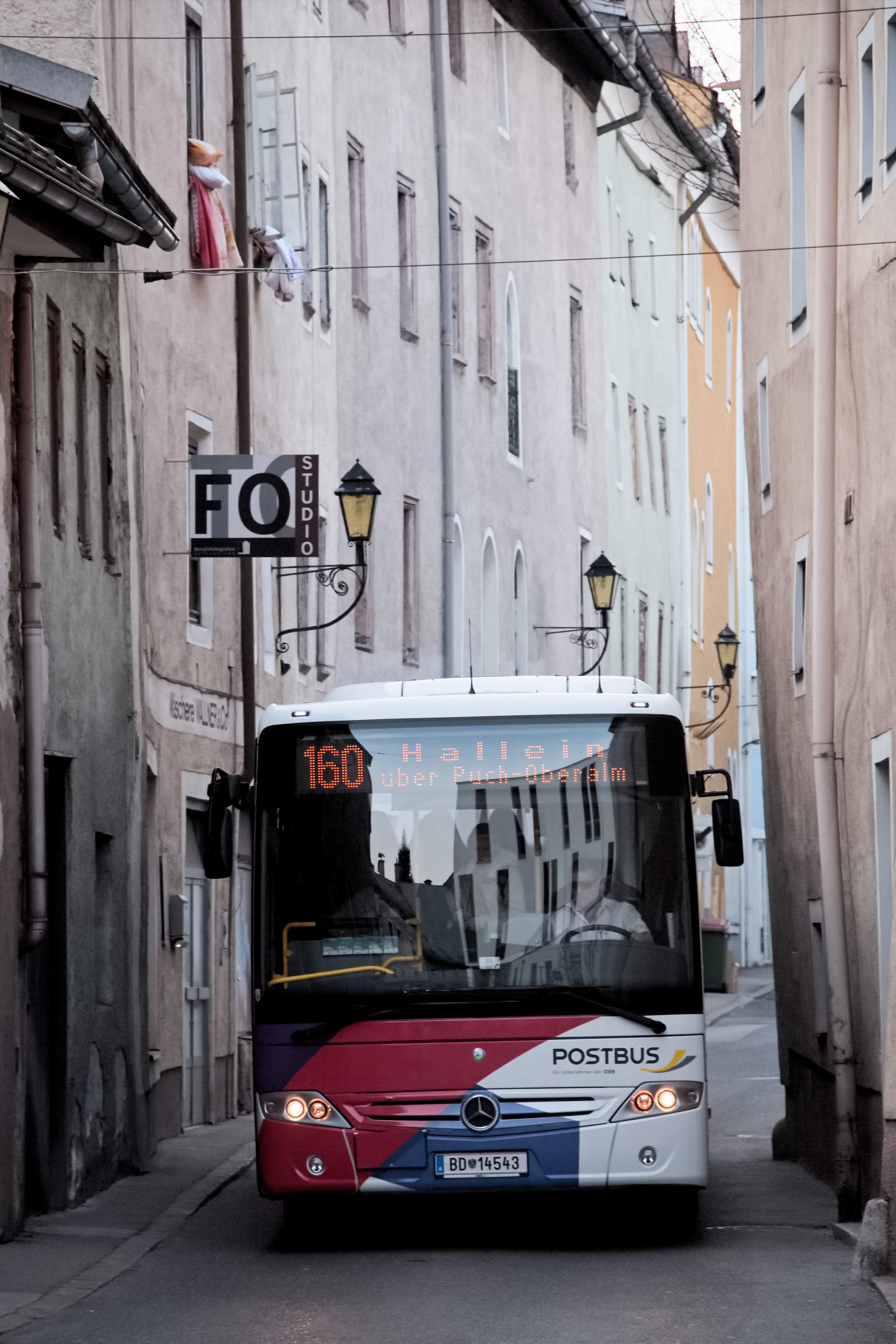 Postautobus im Linieneinsatz in der Halleiner Altstadt (Bräuerstraße)